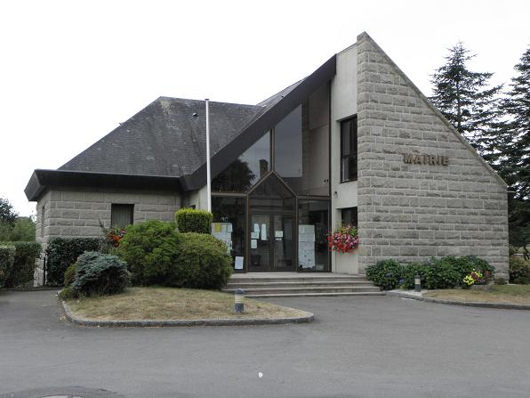 Mairie de St-Étienne-en-Coglès (35)